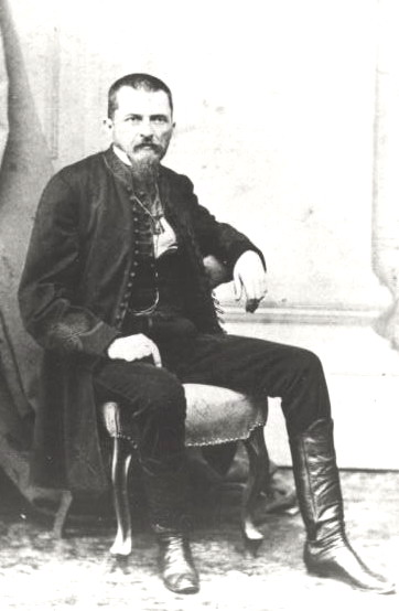 Vilmos Zsigmondy (1821-1888) ingénieur des mines, membre de l'Académie hongroise des sciences.